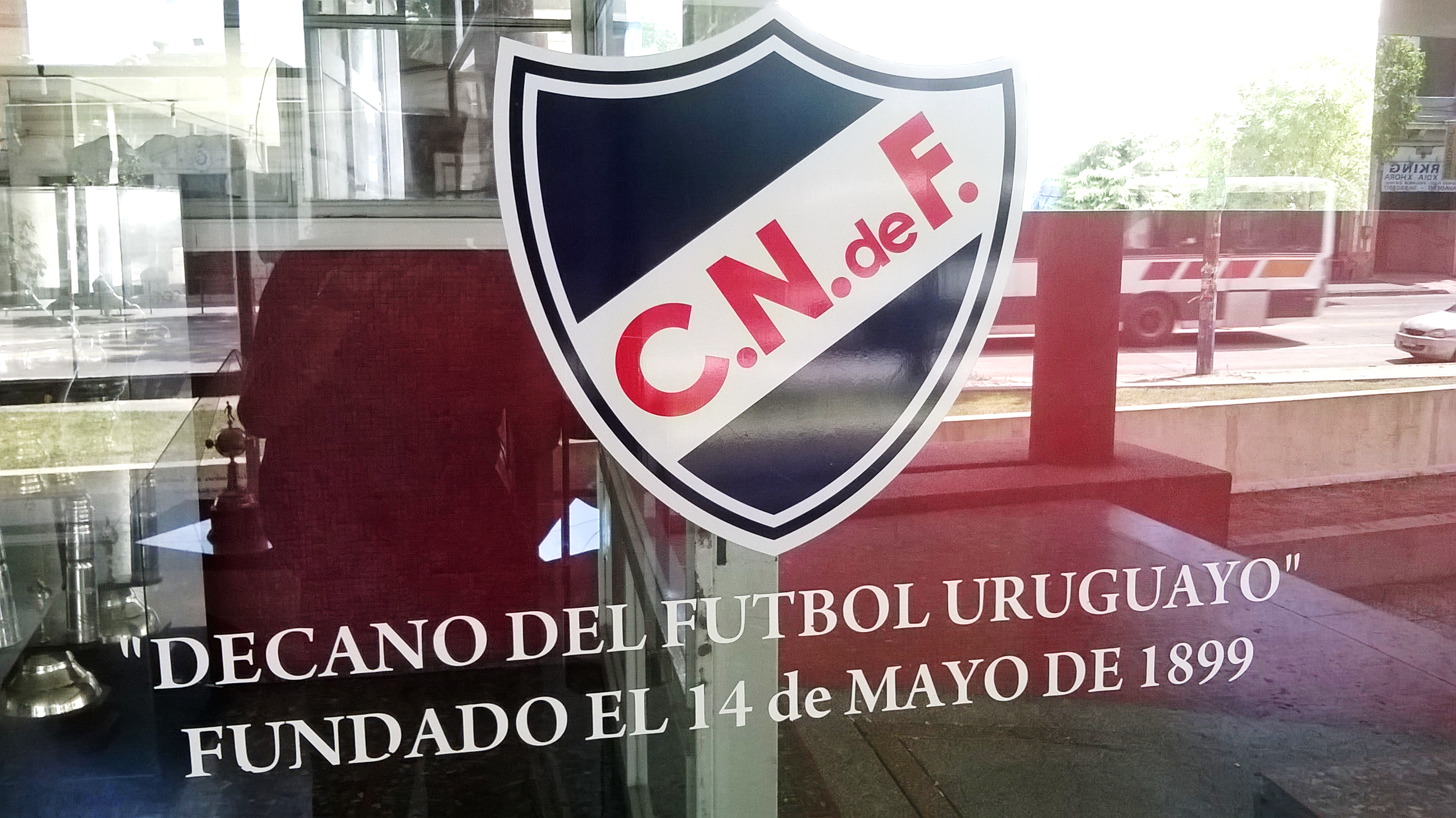 Sede de Nacional